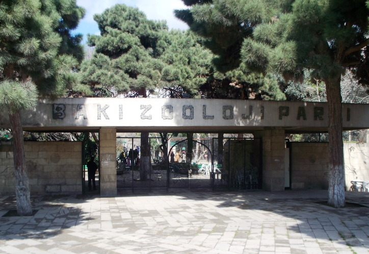 Бакинский Зоологический Парк